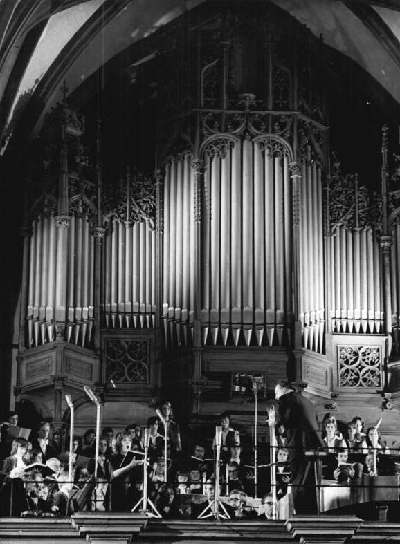 Leipzig, Thomaskirche, Orgel ADN-ZB Gahlbeck 19.9.75-Bau - Leipzig: III. Internationales Bachfest der DDR - Gemeinsam mit dem Leipziger Gewandhausorchester unter Leitung von Prof. Kurt Masur führte der Pozaner Knabenchor am Abend des 17.9.75 in der Leipziger Thomaskirche die Matthäus-Passion von J.S. Bach auf. Zu den Solisten dieser glanzvollen Darbietung gehörte auch die Sopranistin Magdalena Falewicz aus der VR Polen (Mitte-l.)